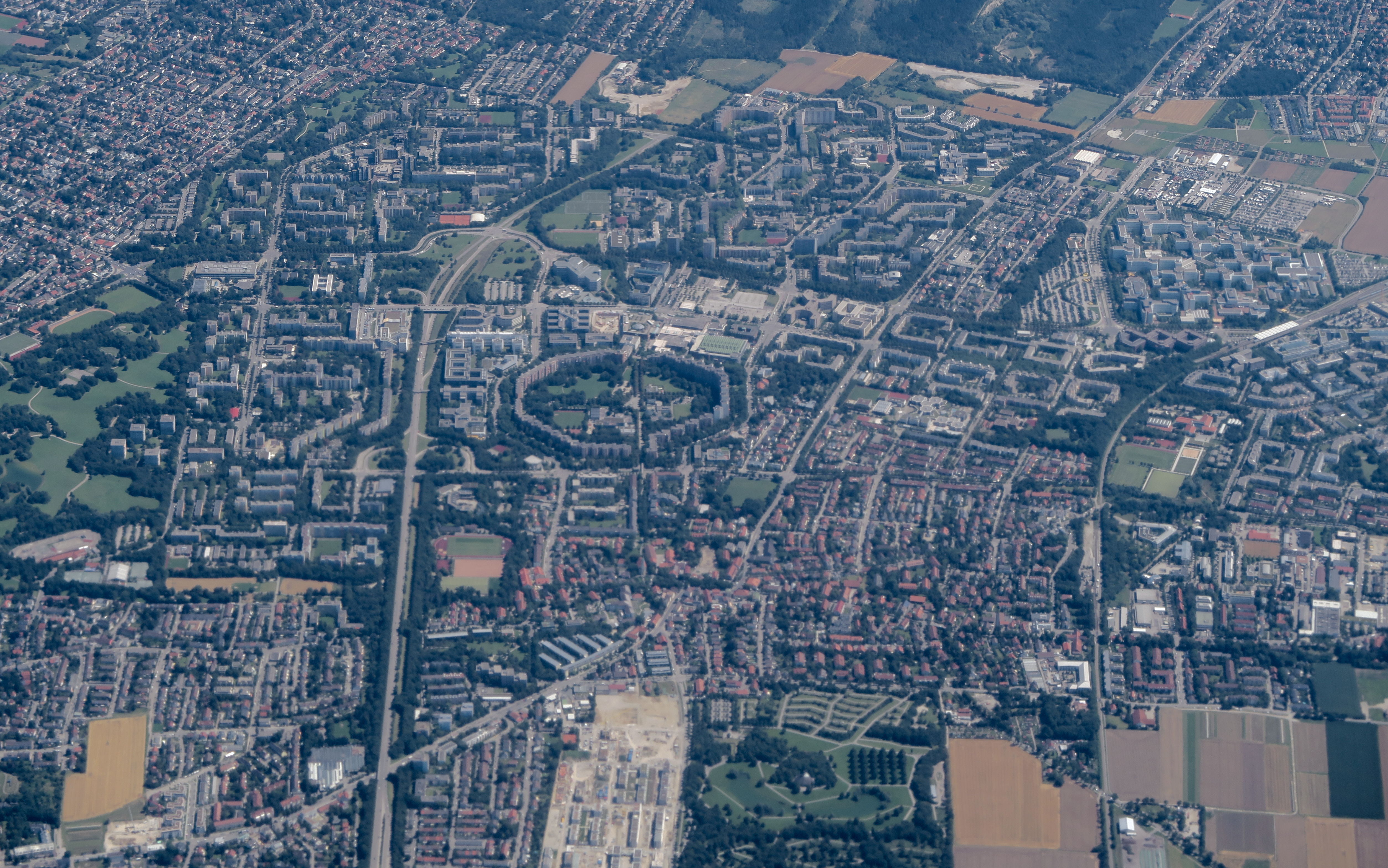 Luftbild des Stadtteils Neuperlach in München